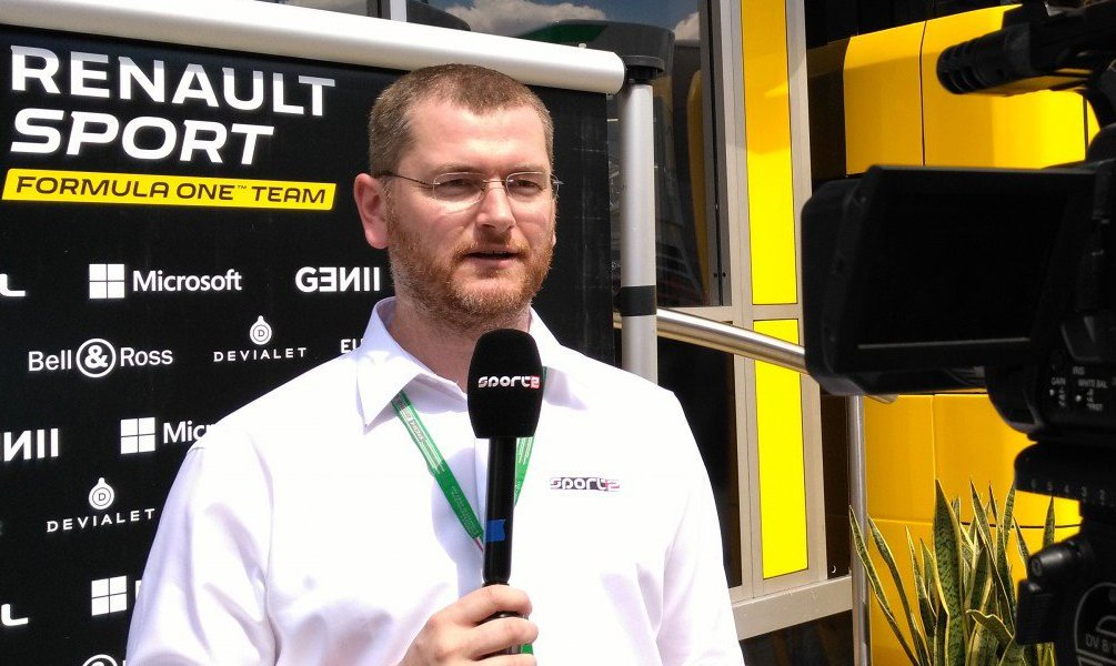 Tomáš Richtr při práci reportéra F1 pro televizi Sport 2